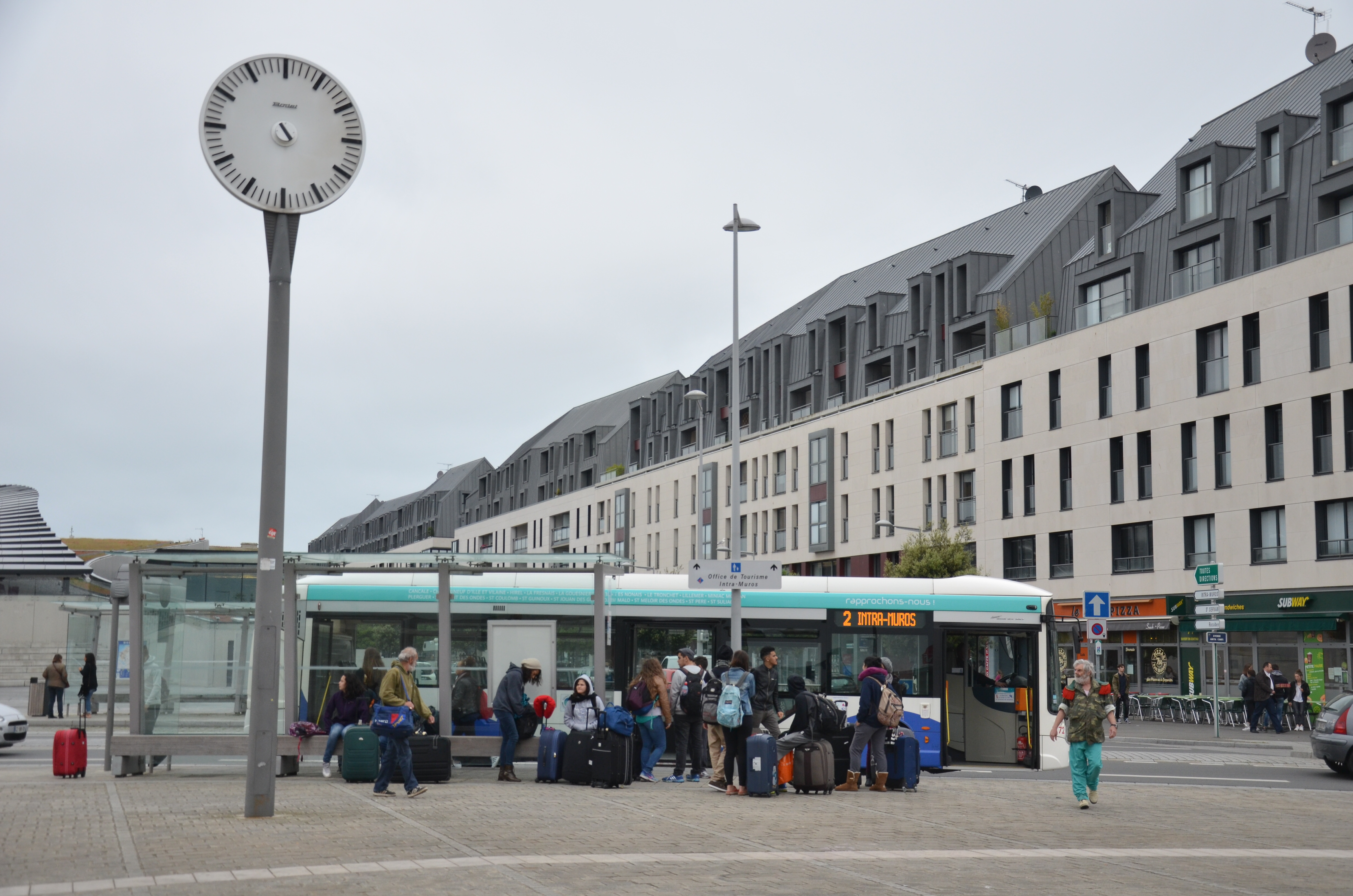 Heuliez GX 327 du réseau MAT en gare de Saint-Malo.